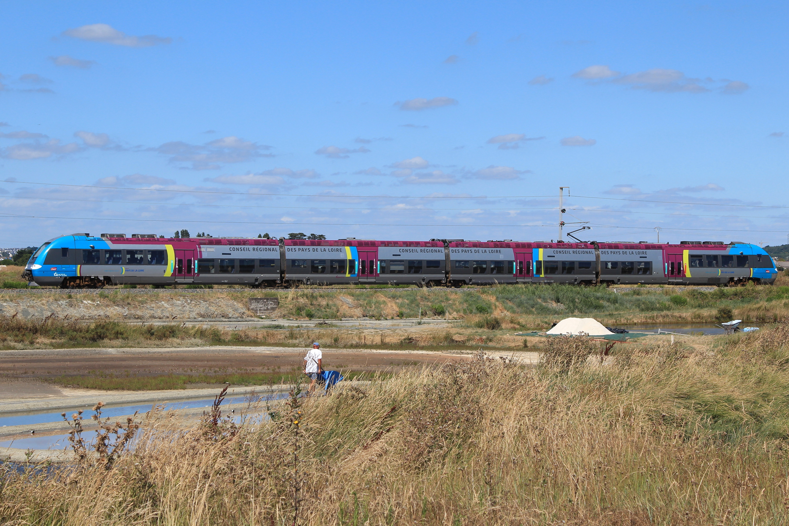 Une ZGC dans les marrais salant arrive en gare du Pouliguen assurant le TER n° 58064 (Le Croisic - Nantes).